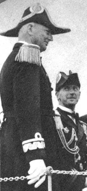 Kontradmirał Józef Unrug w 1937 roku w czasie uroczystości obchodów "Dni Morza" w Gdyni.